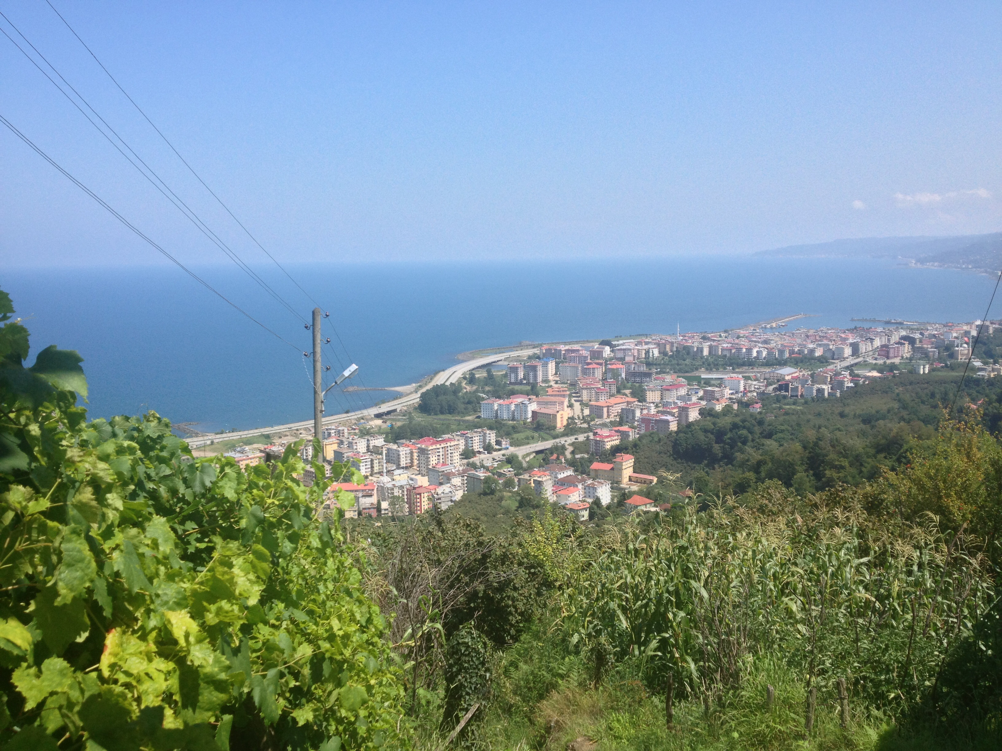 Bozcaali mahallesinden Görele nin görünümü.